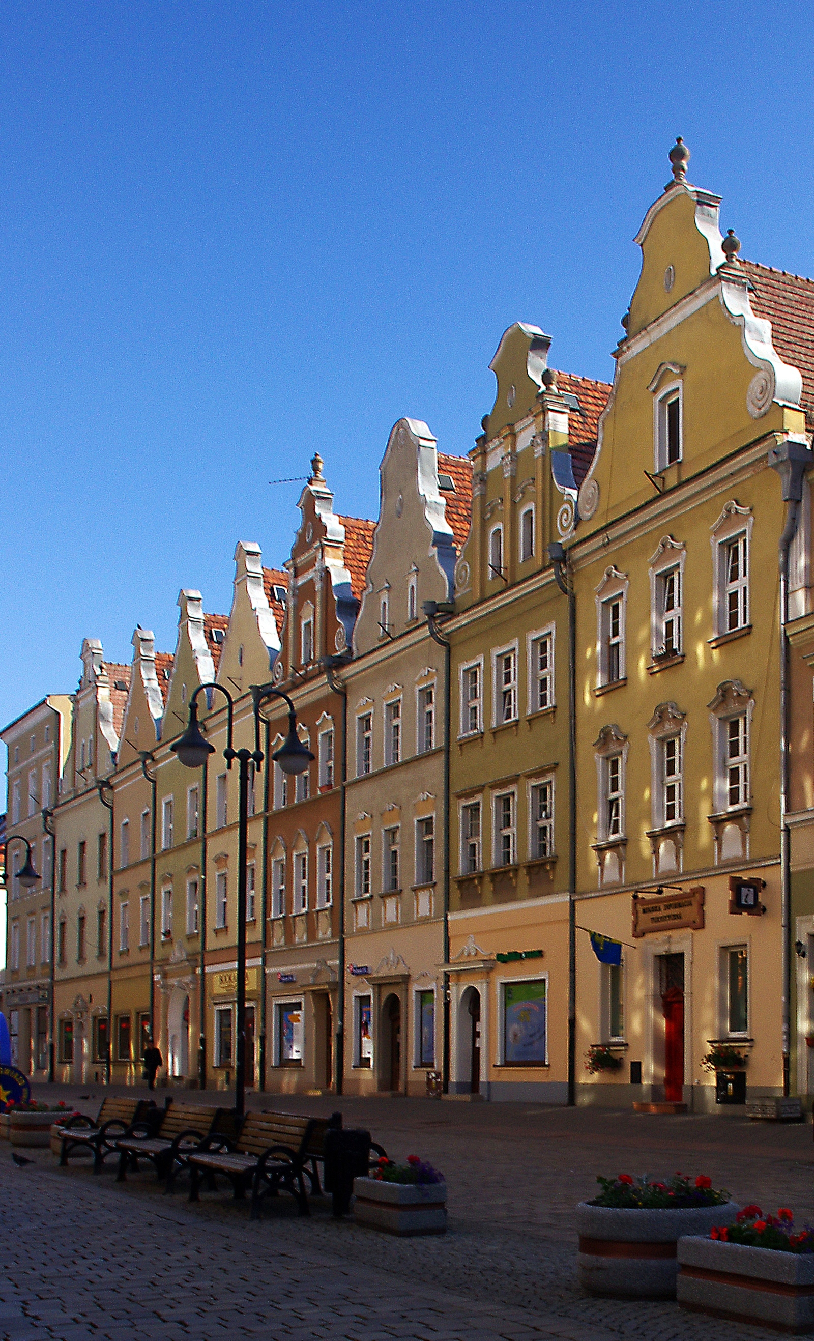 Zespół architektoniczny Rynku, po 1950 Dom, mur., po 1950 Dom, mur., po 1950 Dom, mur., po 1950 Dom, mur., po 1950 Dom, mur., po 1950 Dom, mur., po 1950 Dom, mur., po 1950 Dom, mur., po 1950 Dom, mur., po 1950 Dom, mur., po 1950 Dom, mur., po 1950 Dom, mur., po 1950 Dom, mur., po 1950 Dom, mur., po 1950 Dom, mur., po 1950 Dom, mur., po 1950 Dom, mur., po 1950 Dom, mur., po 1950 Dom, mur., po 1950 Dom, mur., po 1950 Dom, mur., po 1950 Dom, mur., po 1950 Dom, mur., po 1950 Dom, mur., po 1950 Dom, mur., po 1950 Dom, mur., po 1950 Dom, mur., po 1950 Dom, mur., po 1950 Dom, mur., po 1950 Dom, mur., po 1950 Dom, mur., po 1950 Dom, mur., po 1950 Dom, mur., po 1950 Dom, mur., po 1950 Opole Rynek 2 Rynek 3 Rynek 4 Rynek 5/6 Rynek 7 Rynek 8/9 Rynek 11a Rynek 11b Rynek 11c Rynek 12 Rynek 13/14 Rynek 15a Rynek 15b Rynek 15c Rynek 16 Rynek 16a Rynek 16b Rynek 17 Rynek 18 Rynek 19 Rynek 21 Rynek 22 Rynek 23 Rynek 26 Rynek 27 Rynek 28 Rynek 29 Rynek 31a Rynek 32, Opole 10.1994.